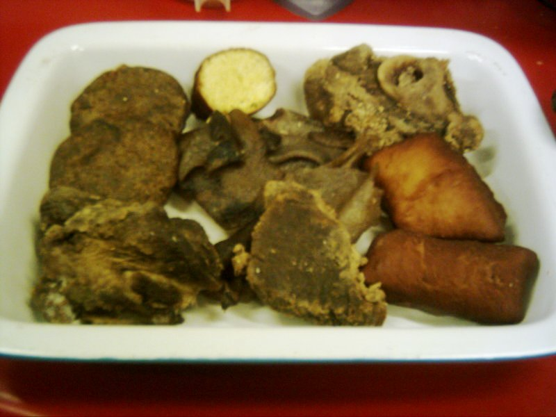 Lloco de carne de chancho, chahuas, milcaos y sopaipillas, plato típico de Chiloé (Chile)